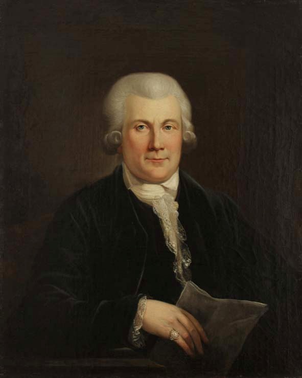 Portret Jana Dekerta